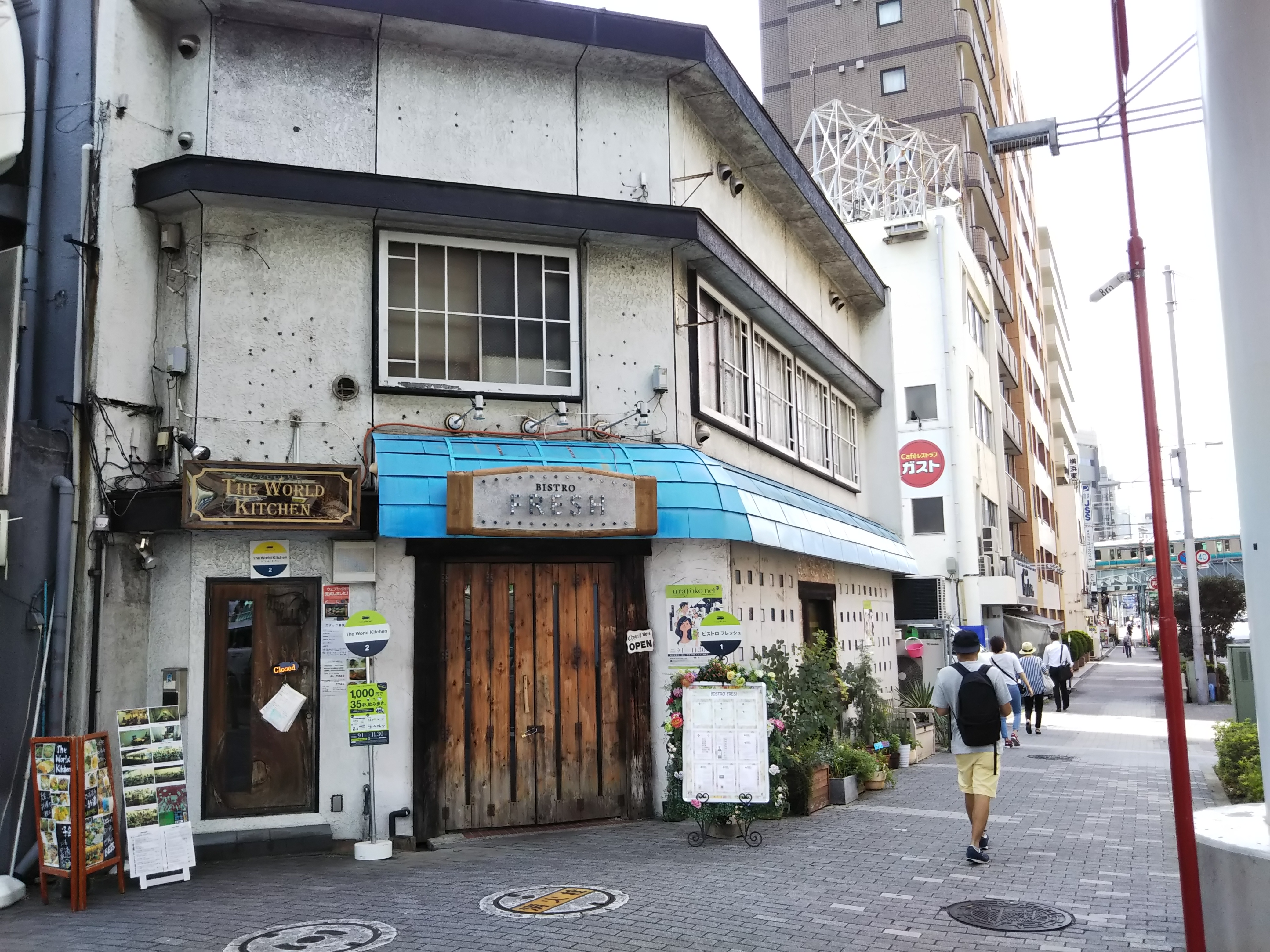 横浜市西区。「裏横浜」にあるビストロ。